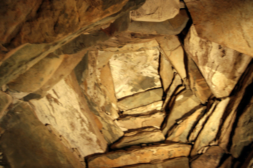 Techo de la sala interior de Newgrange